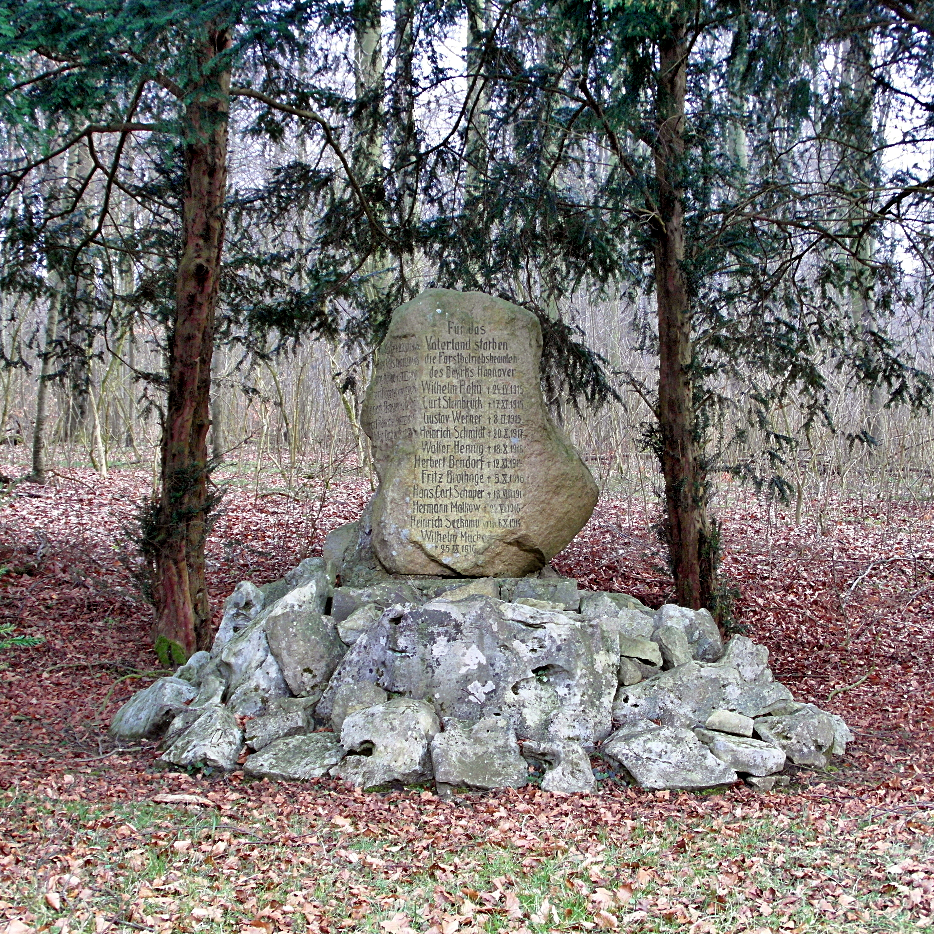 Ehrenmal beim Forsthaus Köllnischfeld